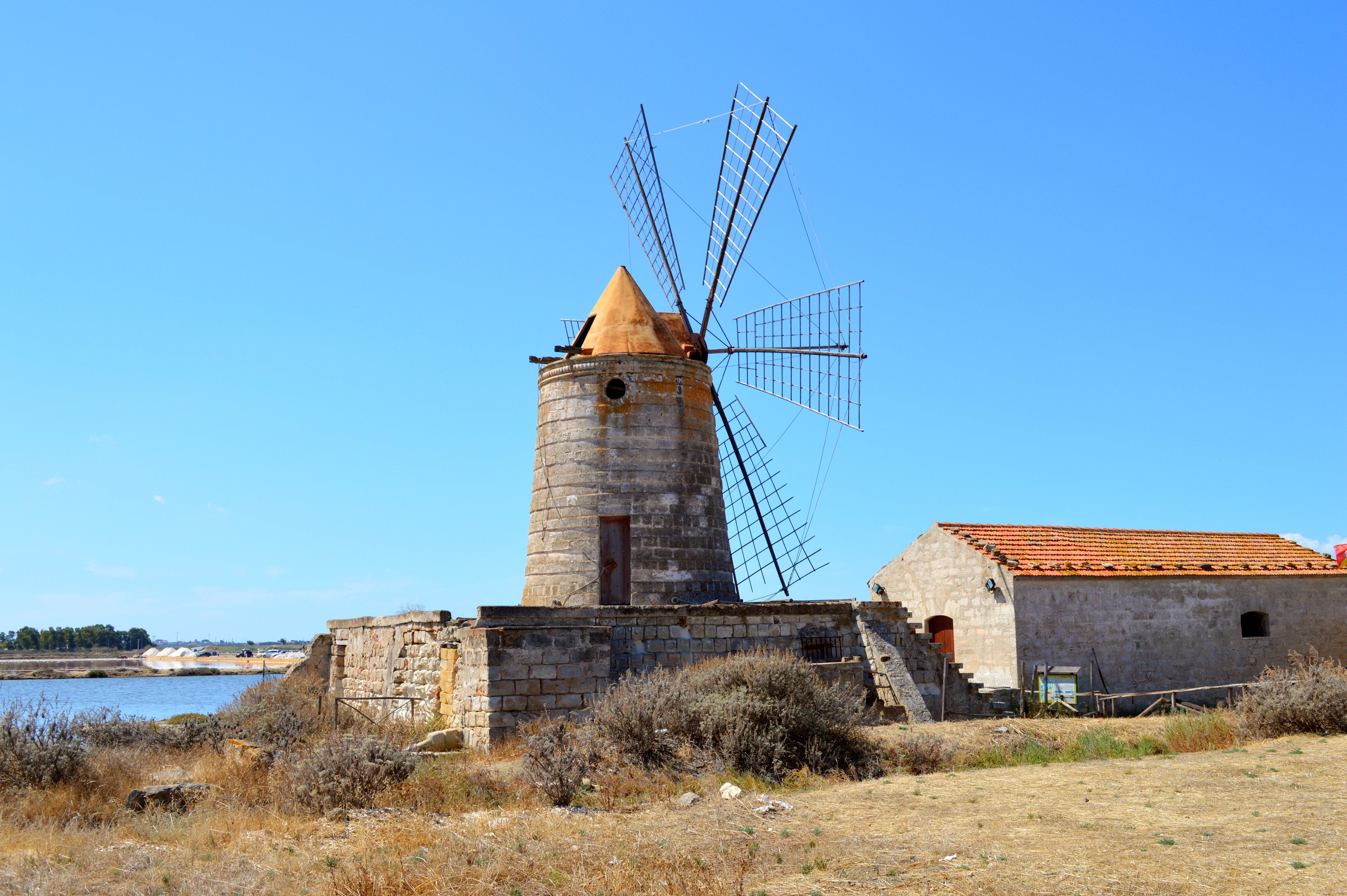 Le Saline di Trapani, Il Mulino